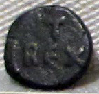 Palazzo Massimo alle Terme